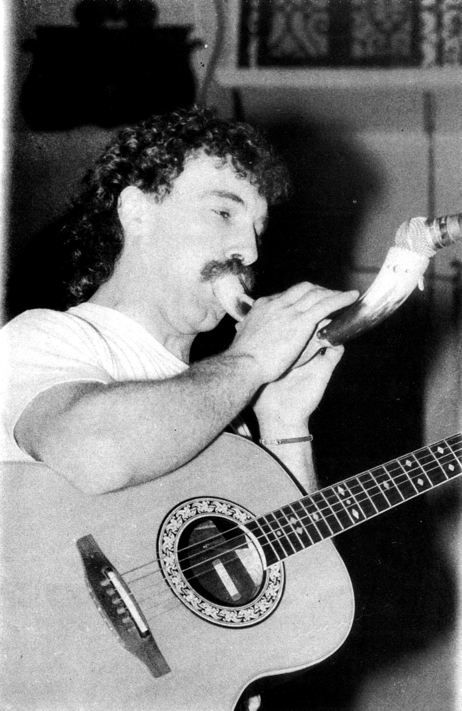 Nafarroa oinez 83, Anje Duhalderen emanaldia